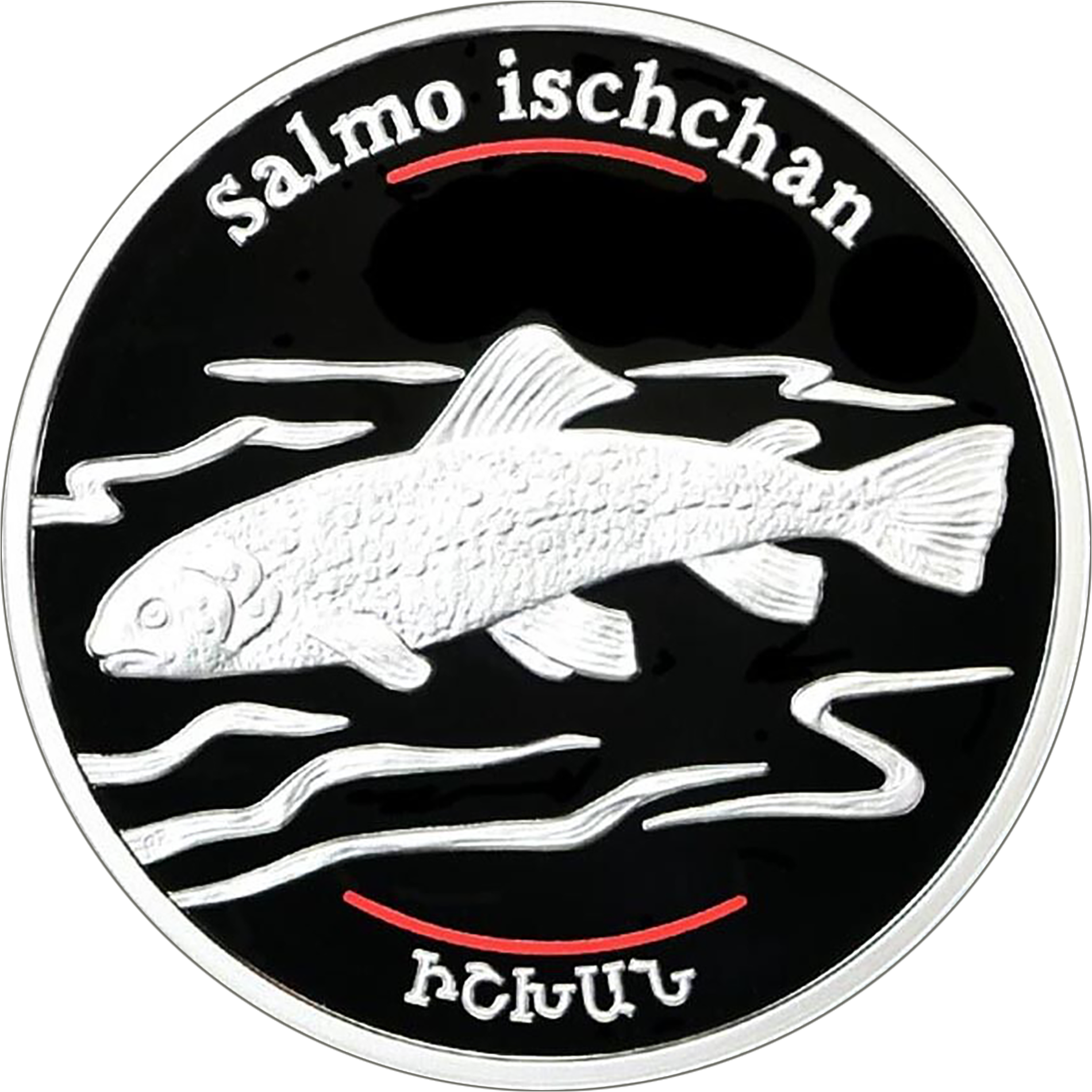 Памятная монета Армении 2007 года серии "Красная книга" "Севанская форель" - 100 драм - серебро 925